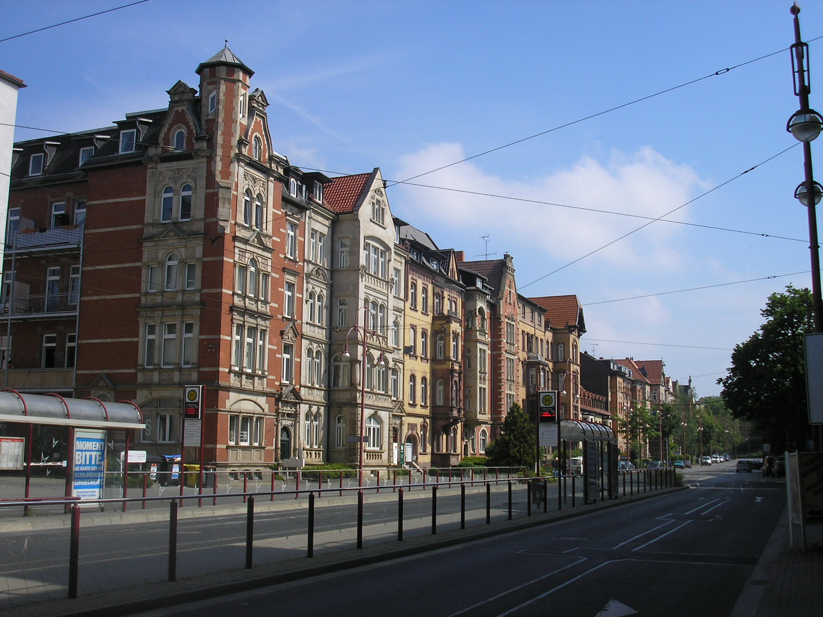 Die Straßenbahnhaltestelle "Kaffeetrichter" in Erfurt.